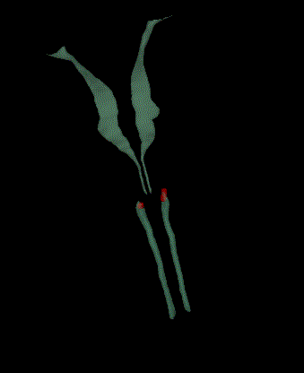 Irudi honetan gorriz cuneatus nukeleoa ikusten da. Grisez cuneatuz faszikulua eta goian erdiko leminiskoa ikusten da.